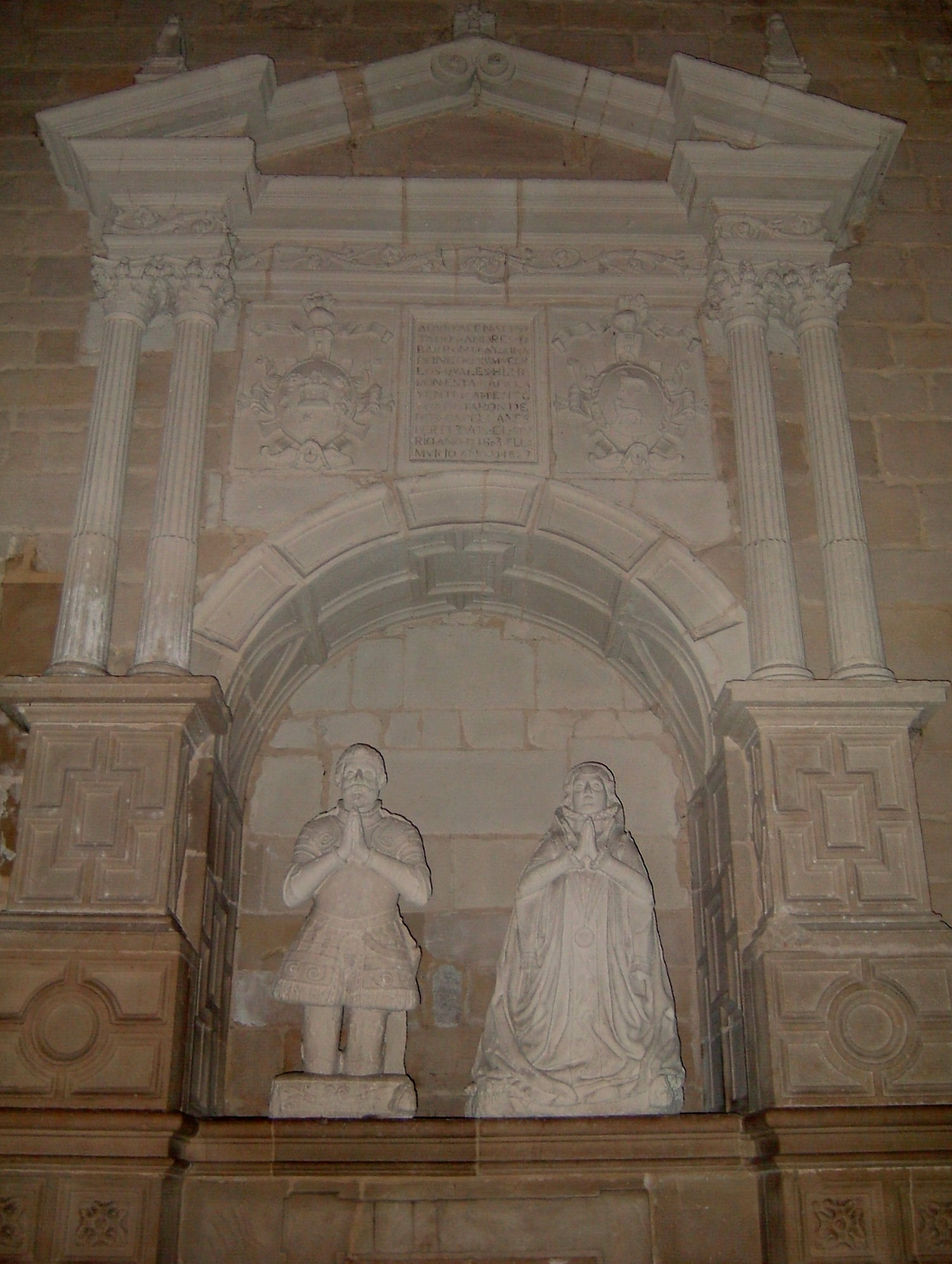 Sepulcro renacentista de don Andrés Barrón y su esposa Catalina de Pinedo en la Capilla de San Andrés de la iglesia de Santa María de Altamira (Miranda de Ebro, Burgos, España).